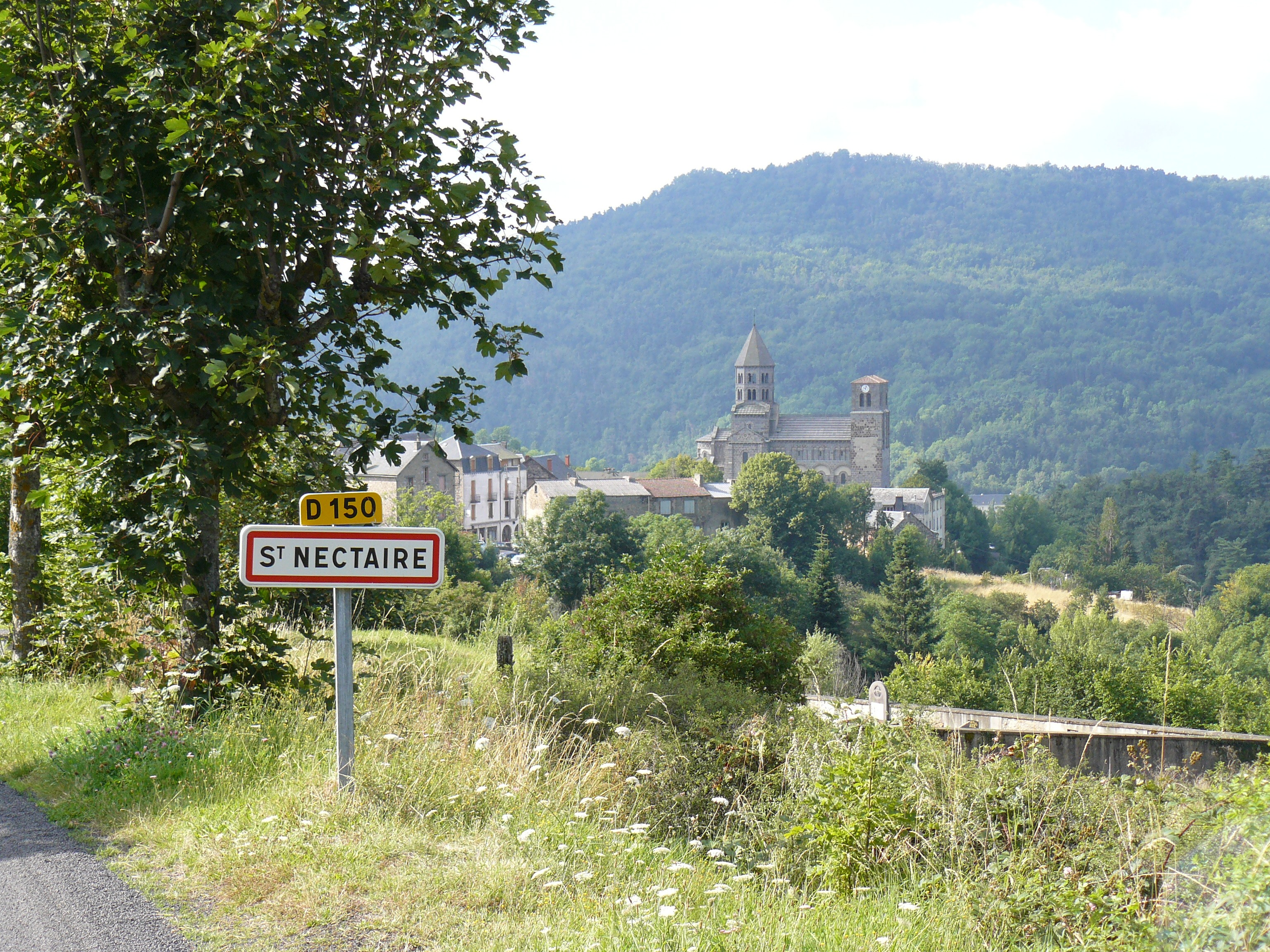 Entrée de St-Nectaire (Puy-de-Dôme)